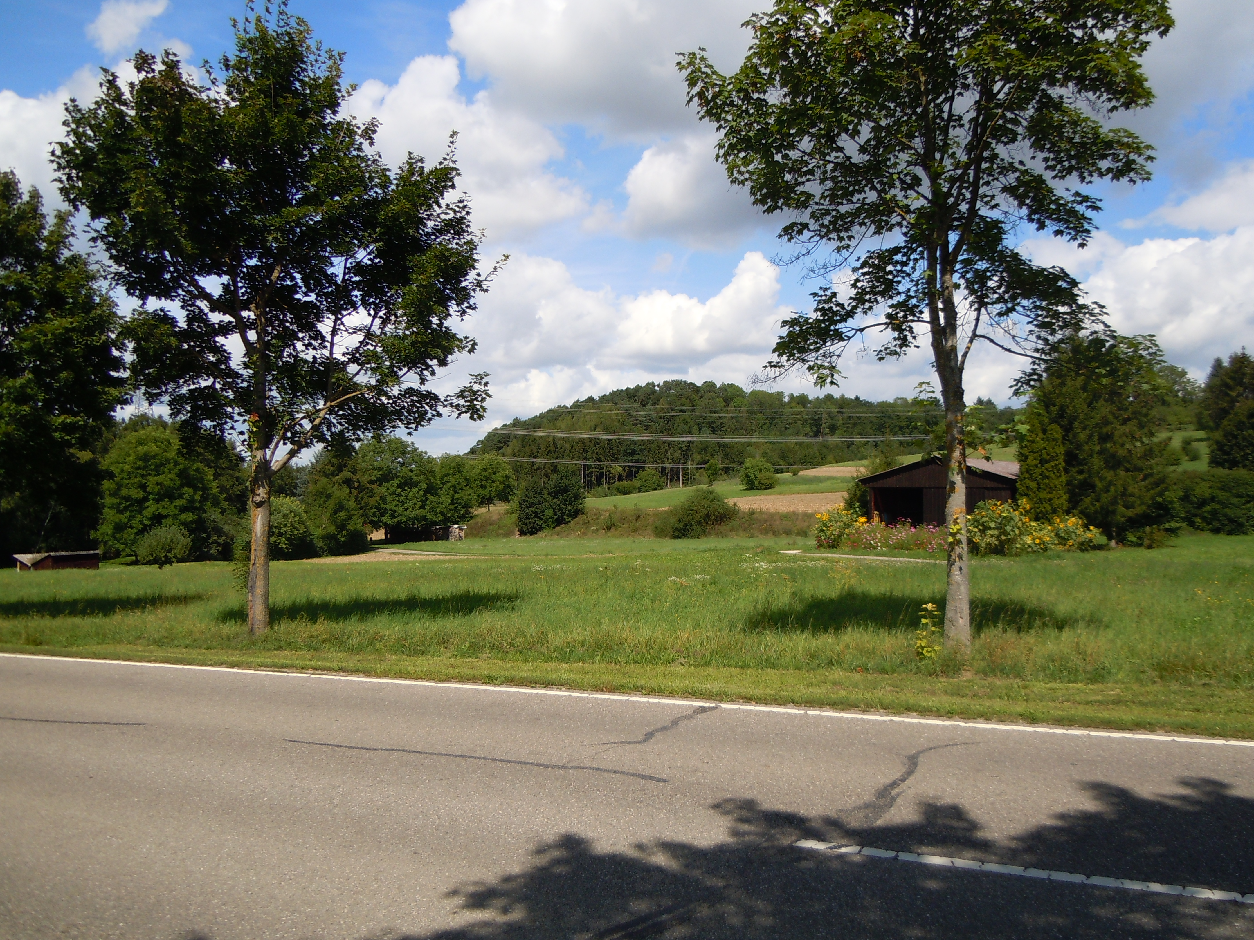 Staufenbühl Großbettlingen, Blickrichtung Nordwest